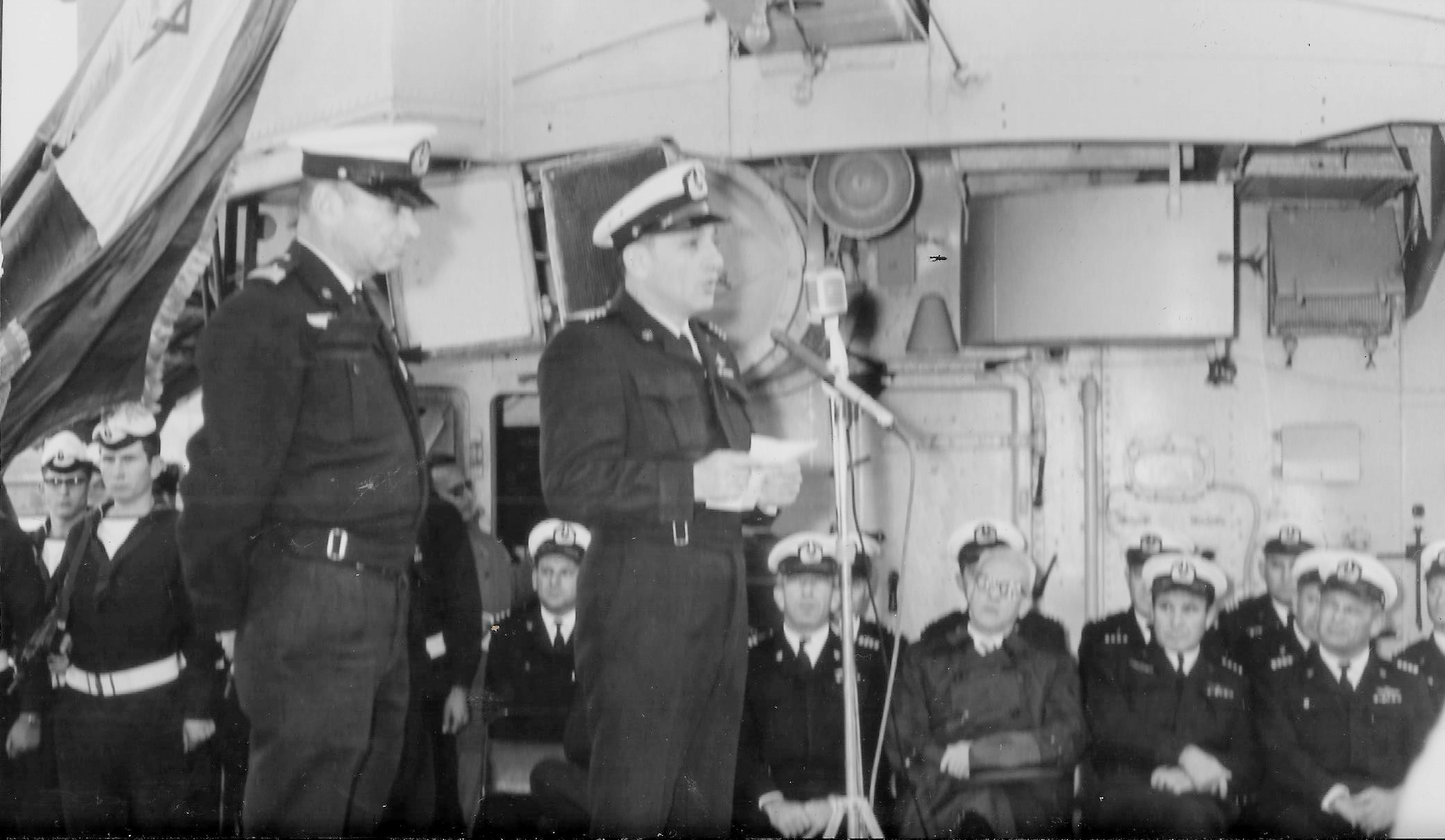 החלפת פיקוד בחיל היםמאלוף יוחאי בן-נון לאל"מ שלמה אראל 2 בינואר 1966.